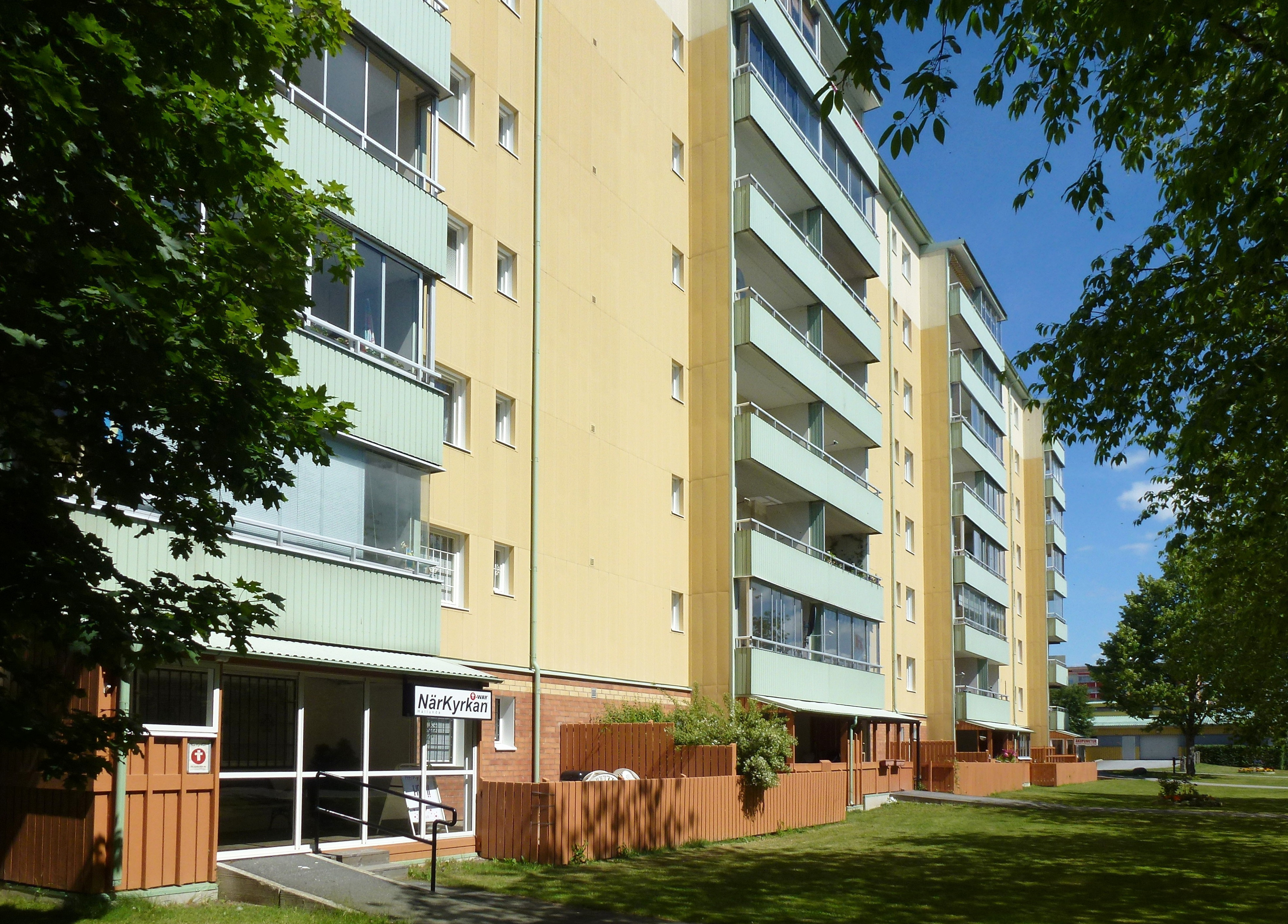 Bebyggelsen från miljonprogrammet i Hallunda